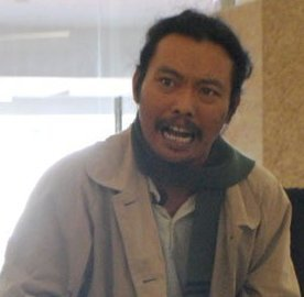 Cucuk Espe, dramawan dan penulis era 2000an yang cukup produktif